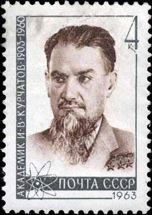 Почтовая марка, посвящённая И. В. Курчатову